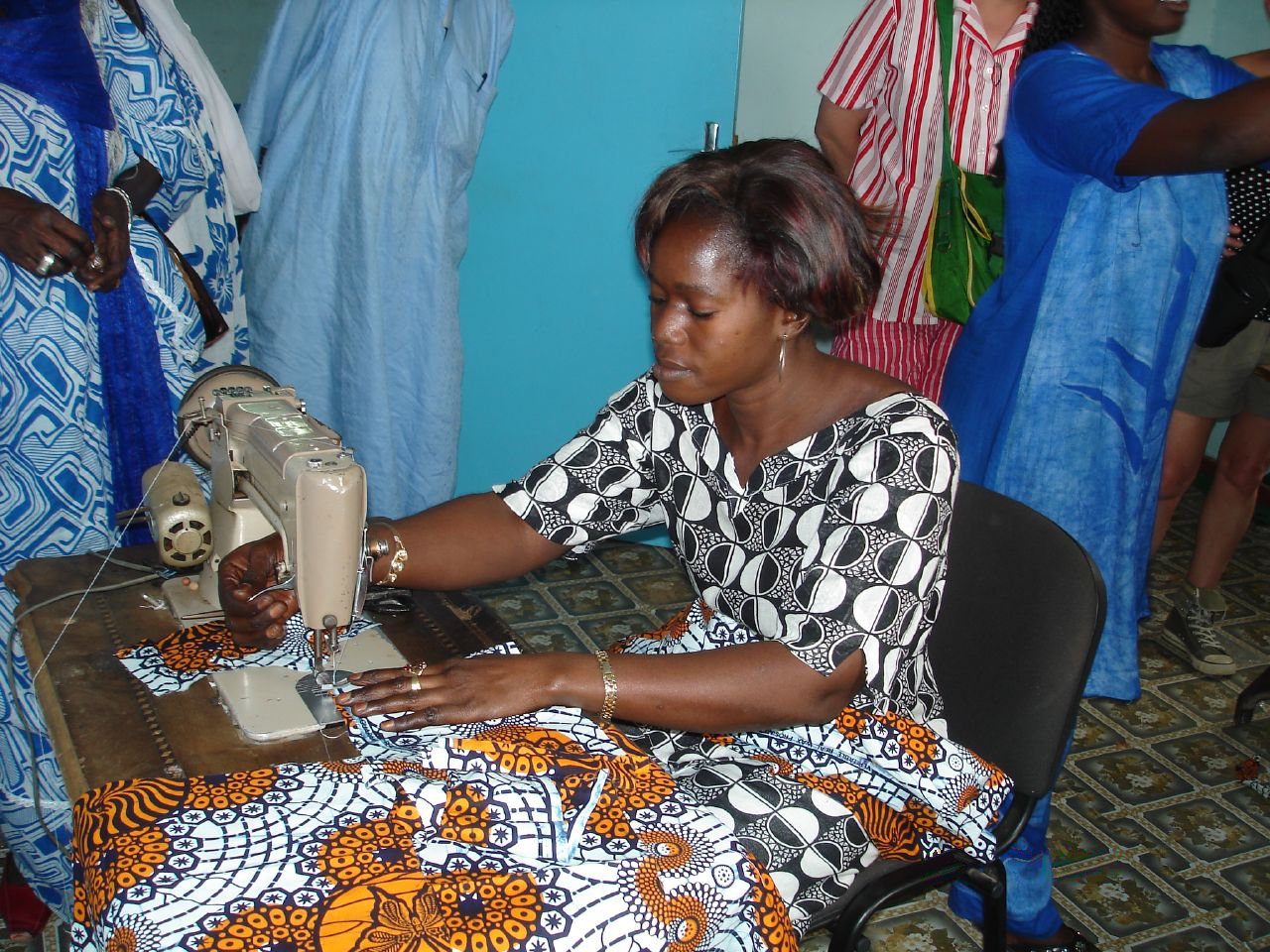 Couturière au Sénégal